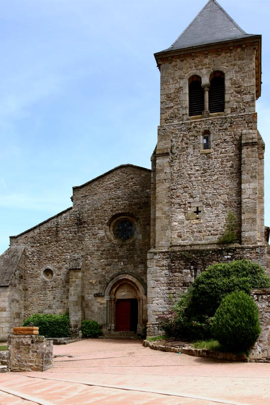 Façade et clocher de l'église de Saint-Germain-en-Brionnais